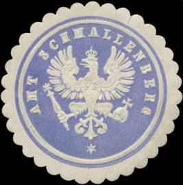 Sealing stamp Title: Amt Schmallenberg Description: blau, weiß, geprägt Place: Schmallenberg size: 4 cm